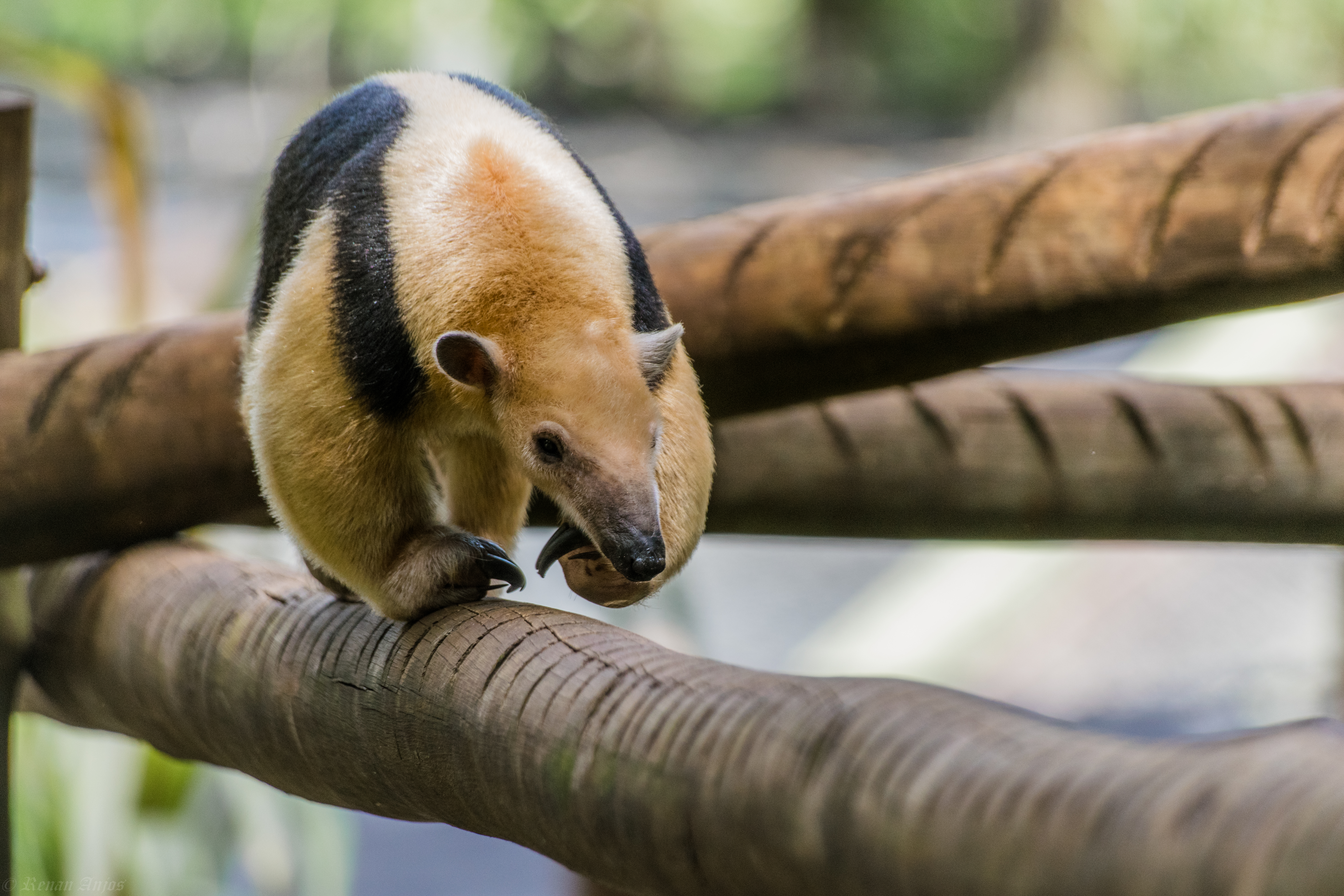 Tamanduá atravessando uma madeira.